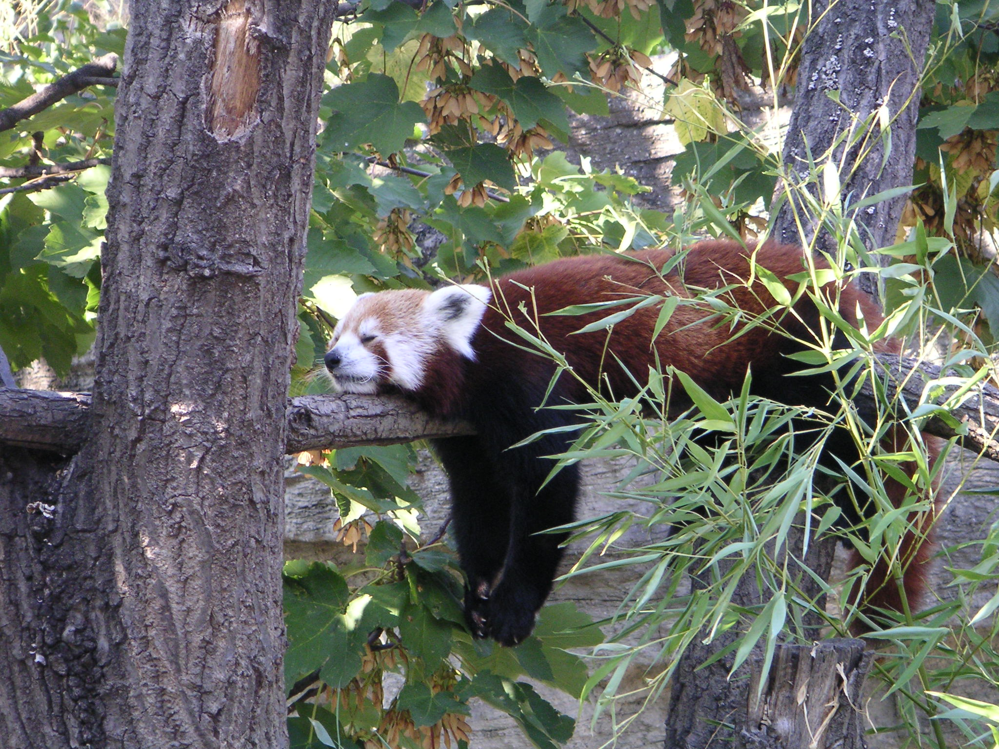 Red panda (Ailurus fulgens) – Kleiner Panda